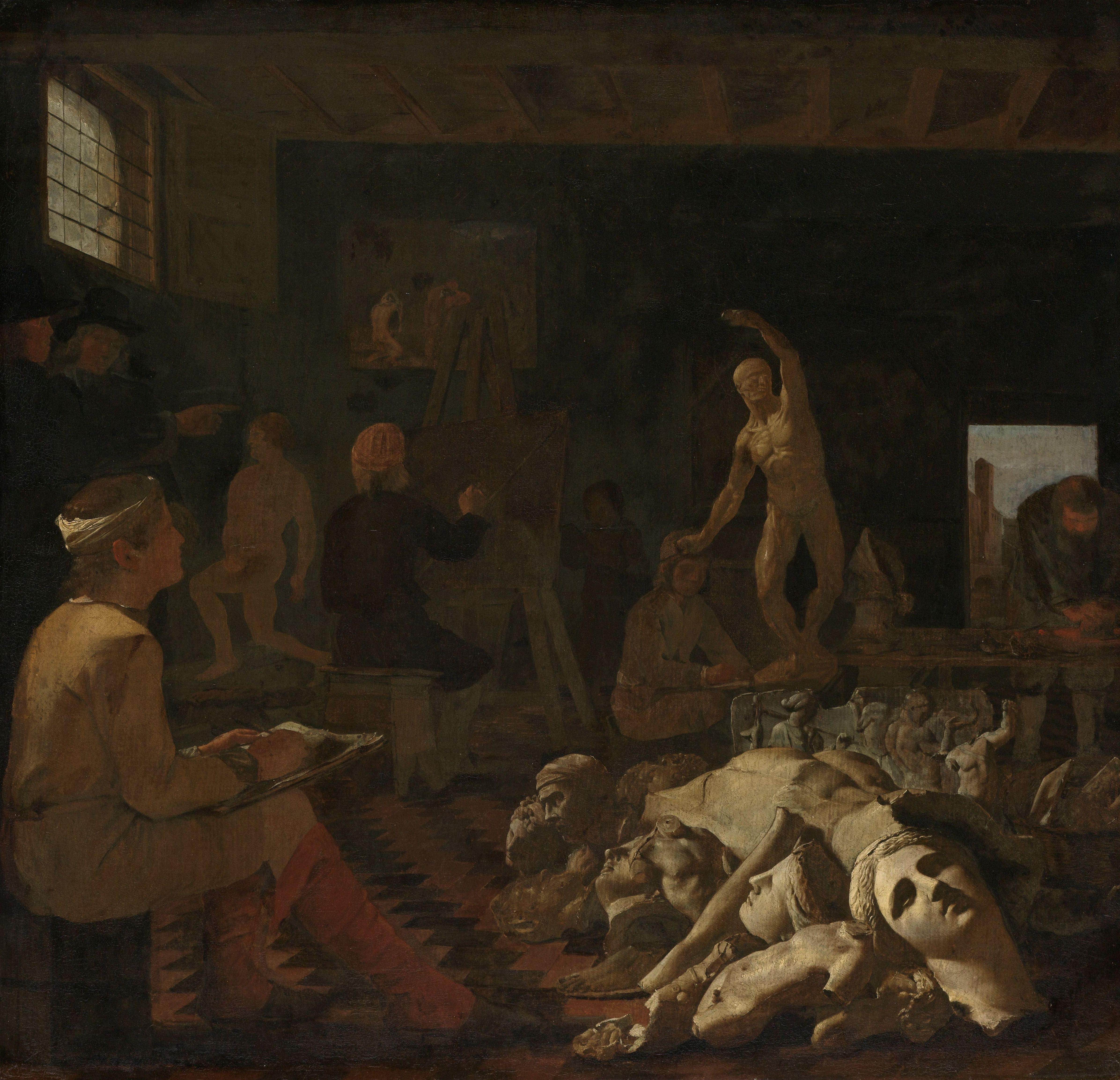 Een schildersatelier waarin twee jongens zitten te tekenen naar een gipsmodel, op de voorgrond ligt een stapel met meer gipsmodellen naar antieke beelden. Links schildert een man naar een mannelijk naaktmodel, twee bezoekers kijken toe. Rechts is een man bezig aan een tafel met het wrijven van verf. Aan de muur hangt een schilderij.; Michael Sweerts (1618–1664), olieverf op doek, ca. 1648–1650